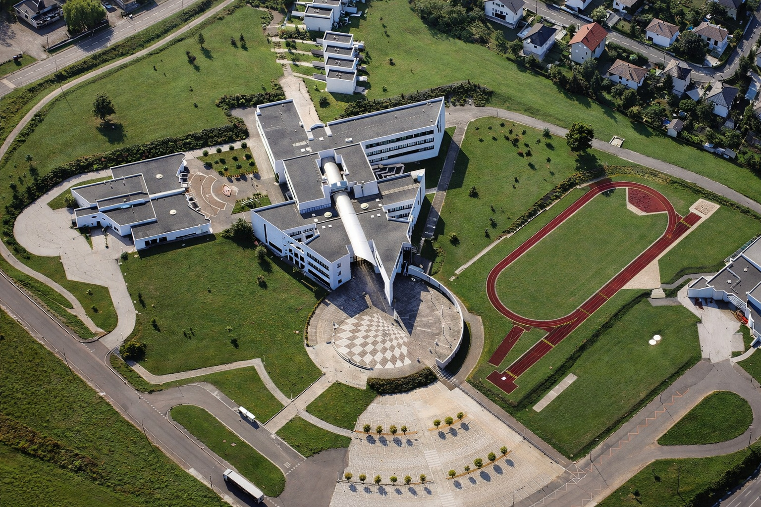 Lycée Les Haberges de Vesoul